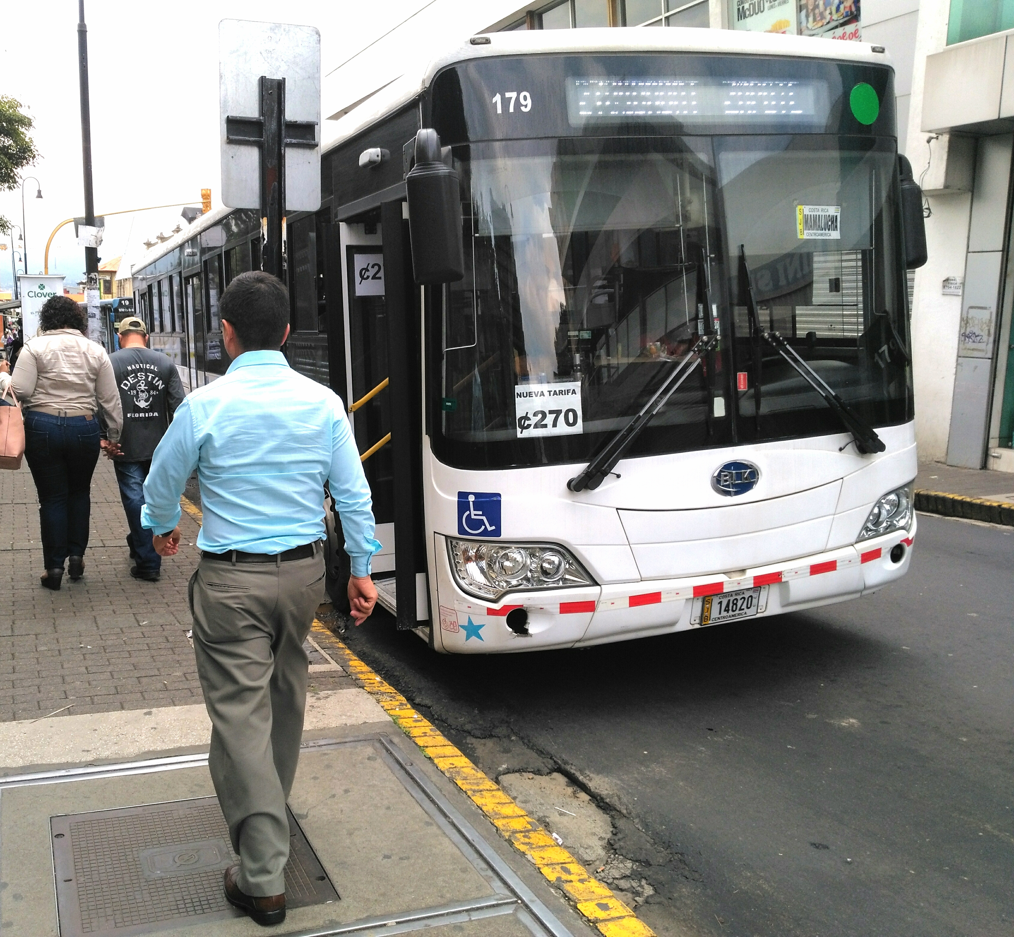 Parabús de Zapote en la calle 5 de San José, Costa Rica